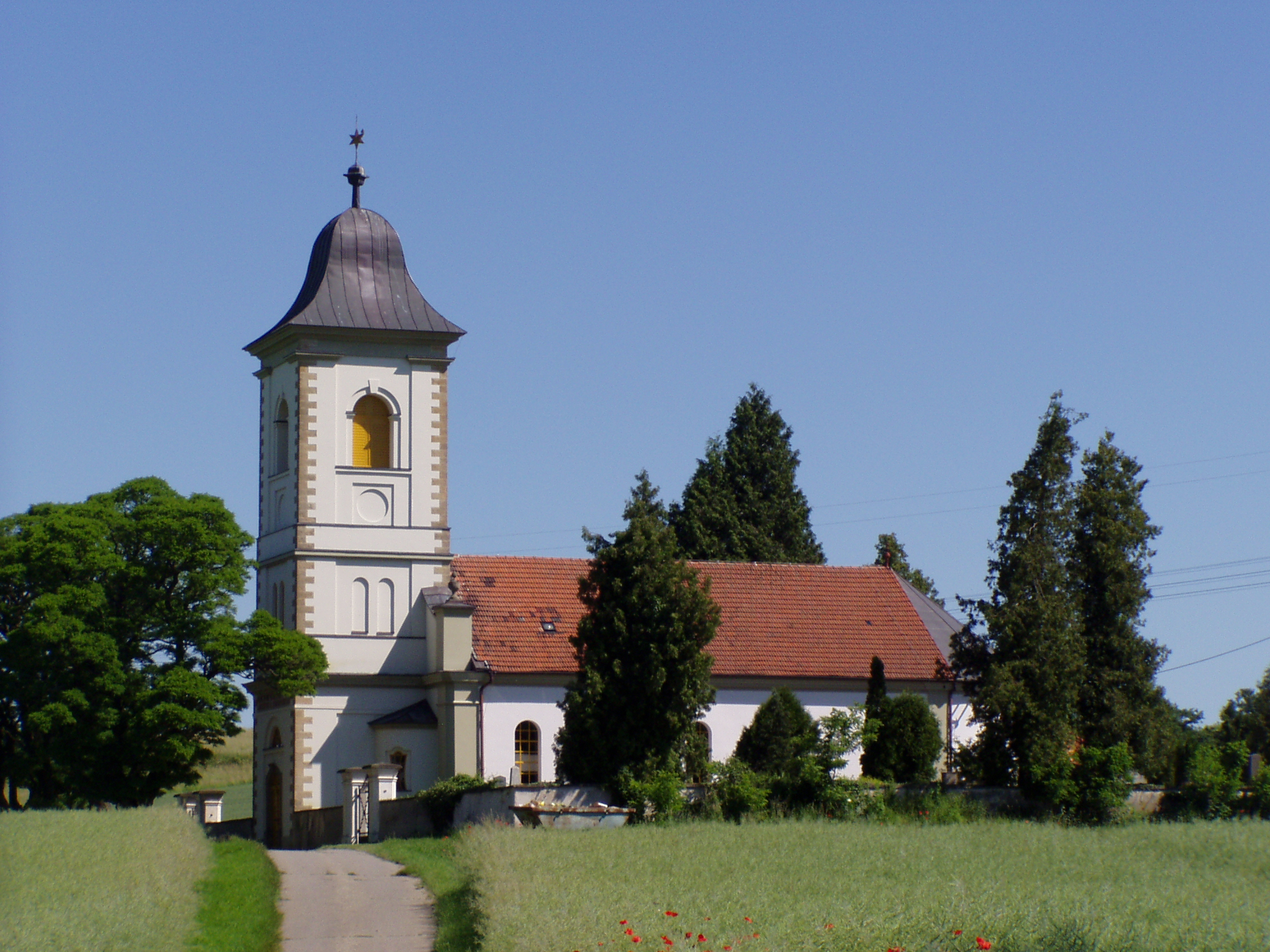 Evangelický kostel v Klášteře nad Dědinou